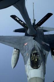 Türkische F-16 wird in der Luft betankt